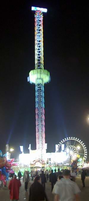 Powertower auf dem Cannstatter Wasen